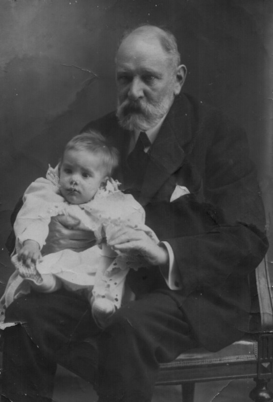 John Trulock co seu neto Camilo José Cela no regazo en 1916.